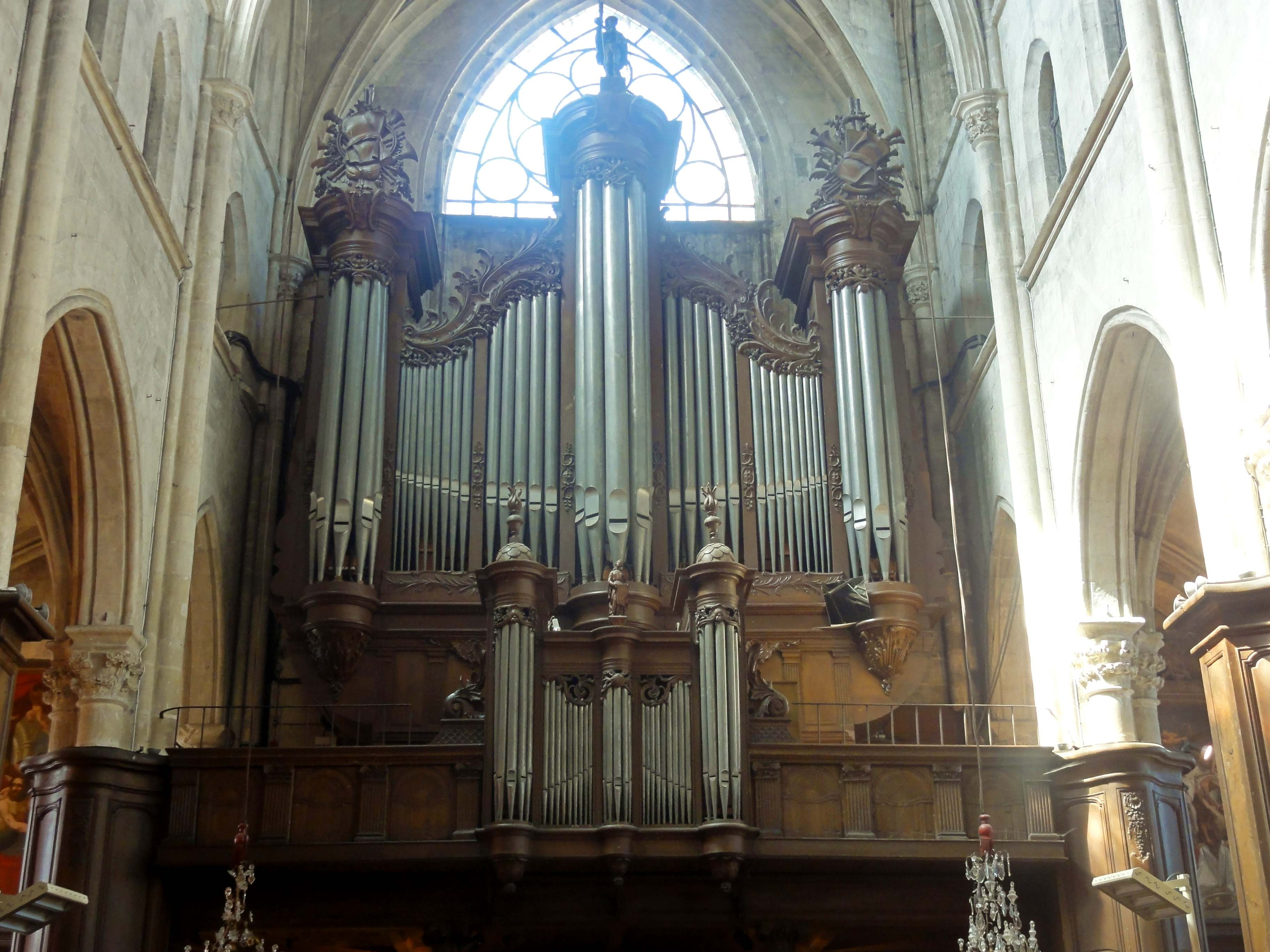 Orgue de tribune.